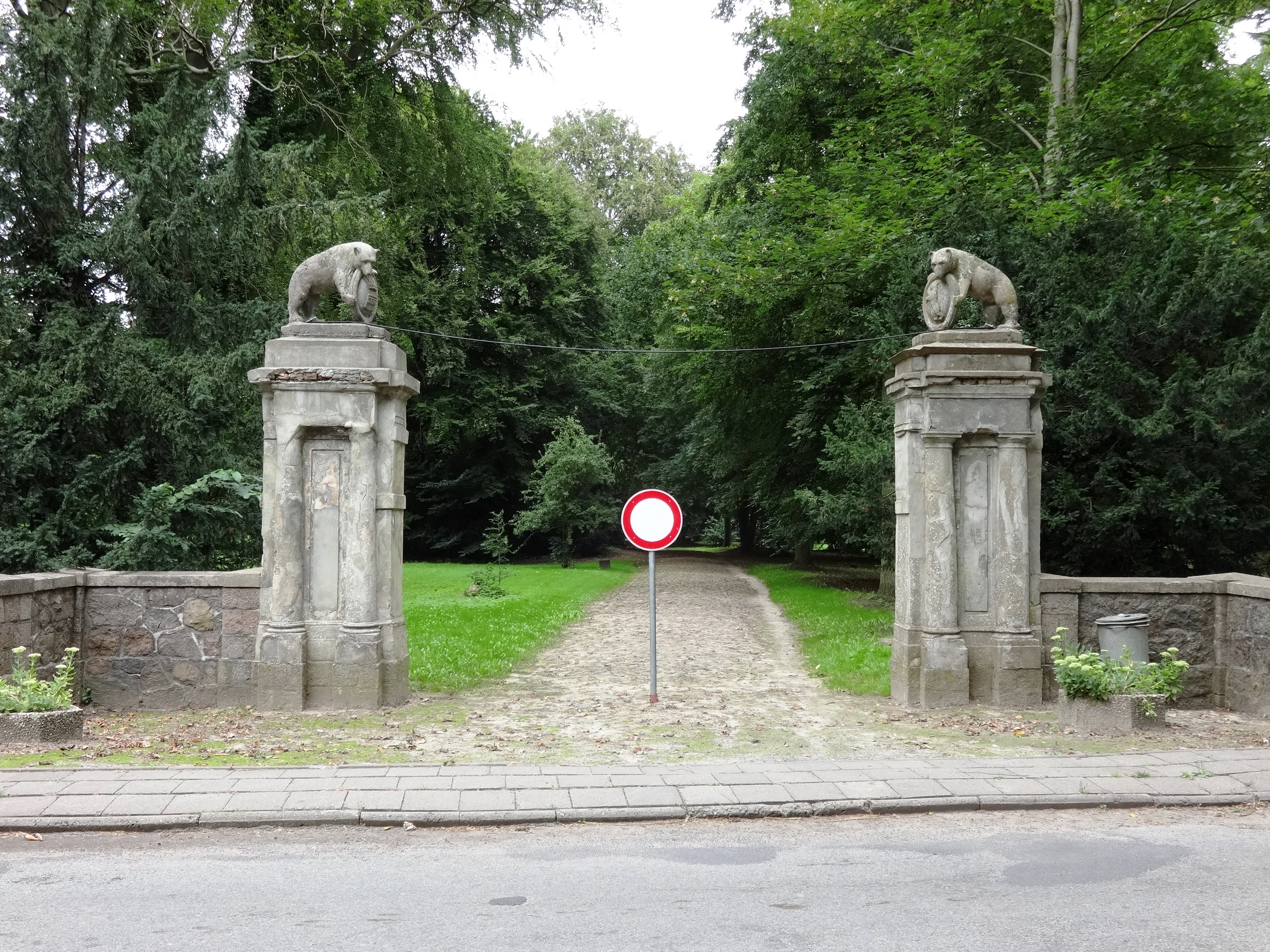 Denkmalgeschützter Landschaftspark in Behrenhoff, Vorpommern-Greifswald, Mecklenburg-Vorpommern